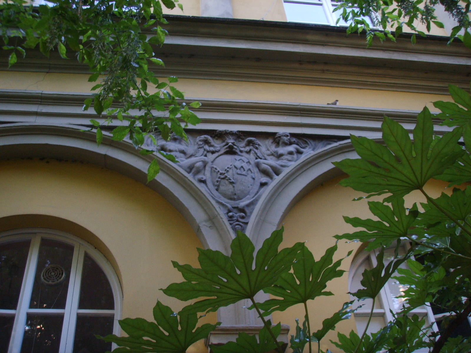 Palazzo malenchini alberti, giardino, ex loggetta 03 stemma alberti mori ubaldini